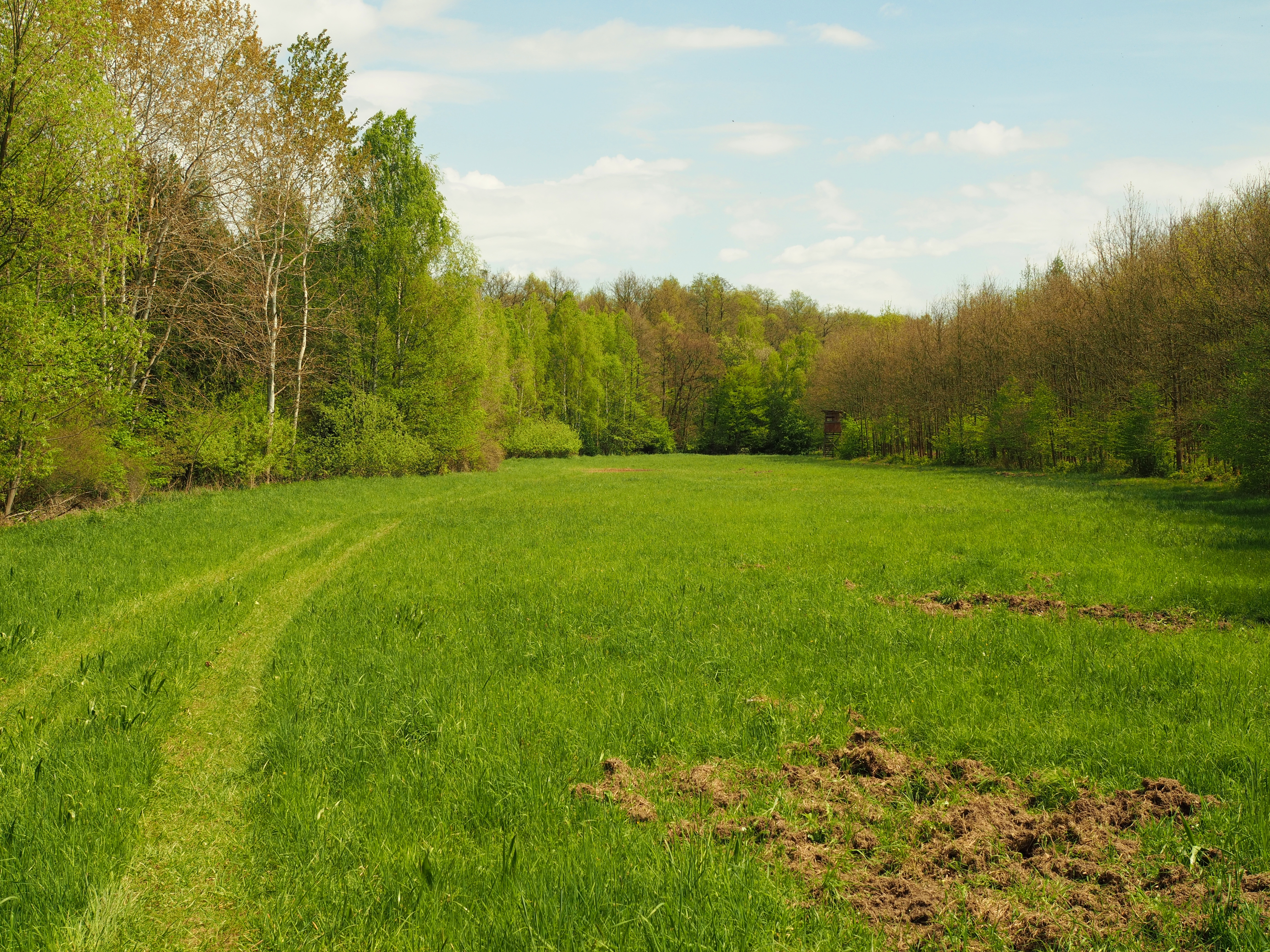 Přírodní památka Dymokursko - Bahenské louky (Natural monument Dymokursko - Bahenské louky), pohled na lokalitu Project: Chráněná území.